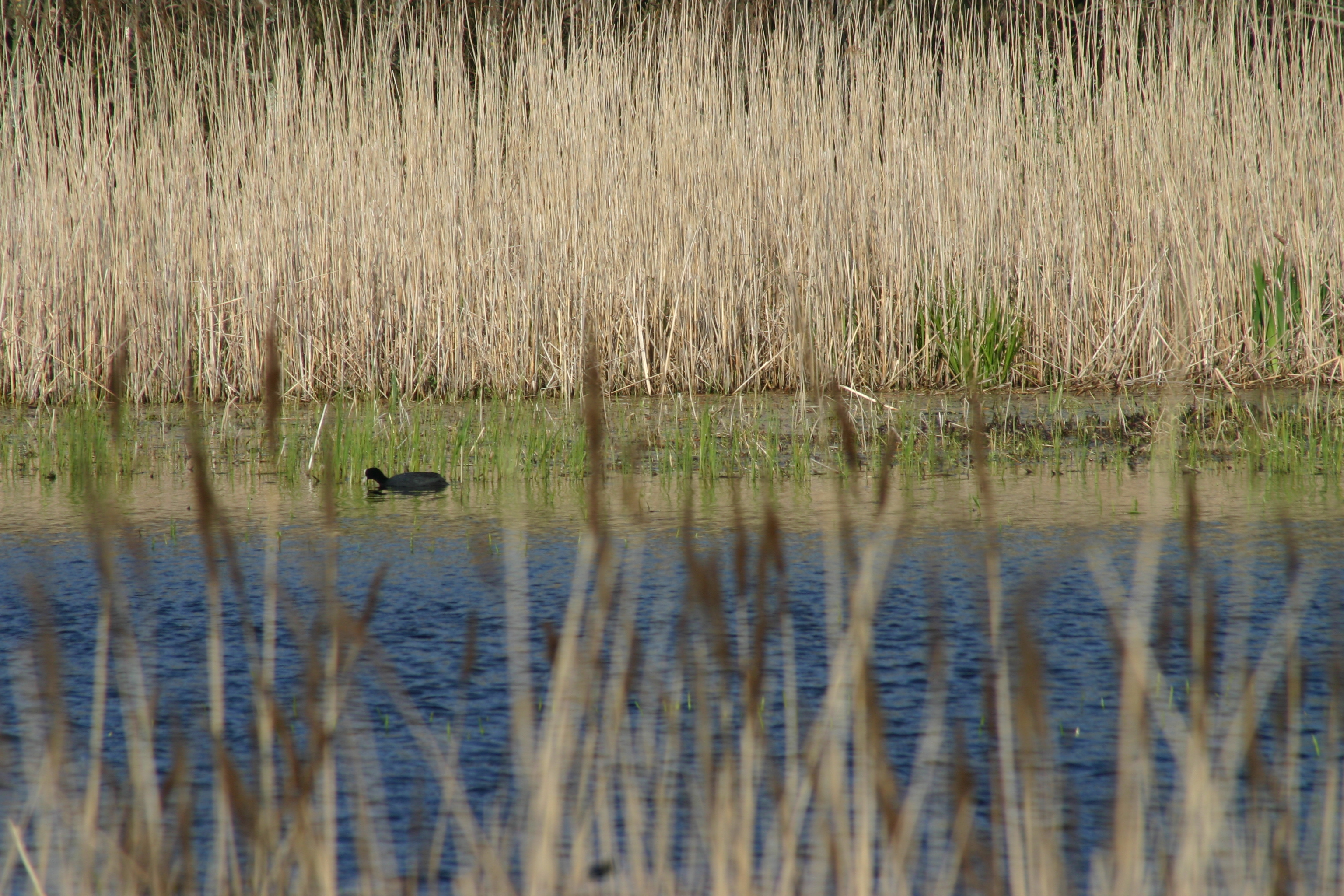 Vue détaillée RN Vauville